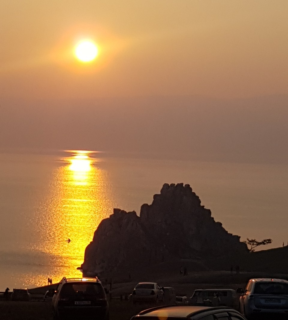 Остров Ольхон. Скала Шаманка на закате.